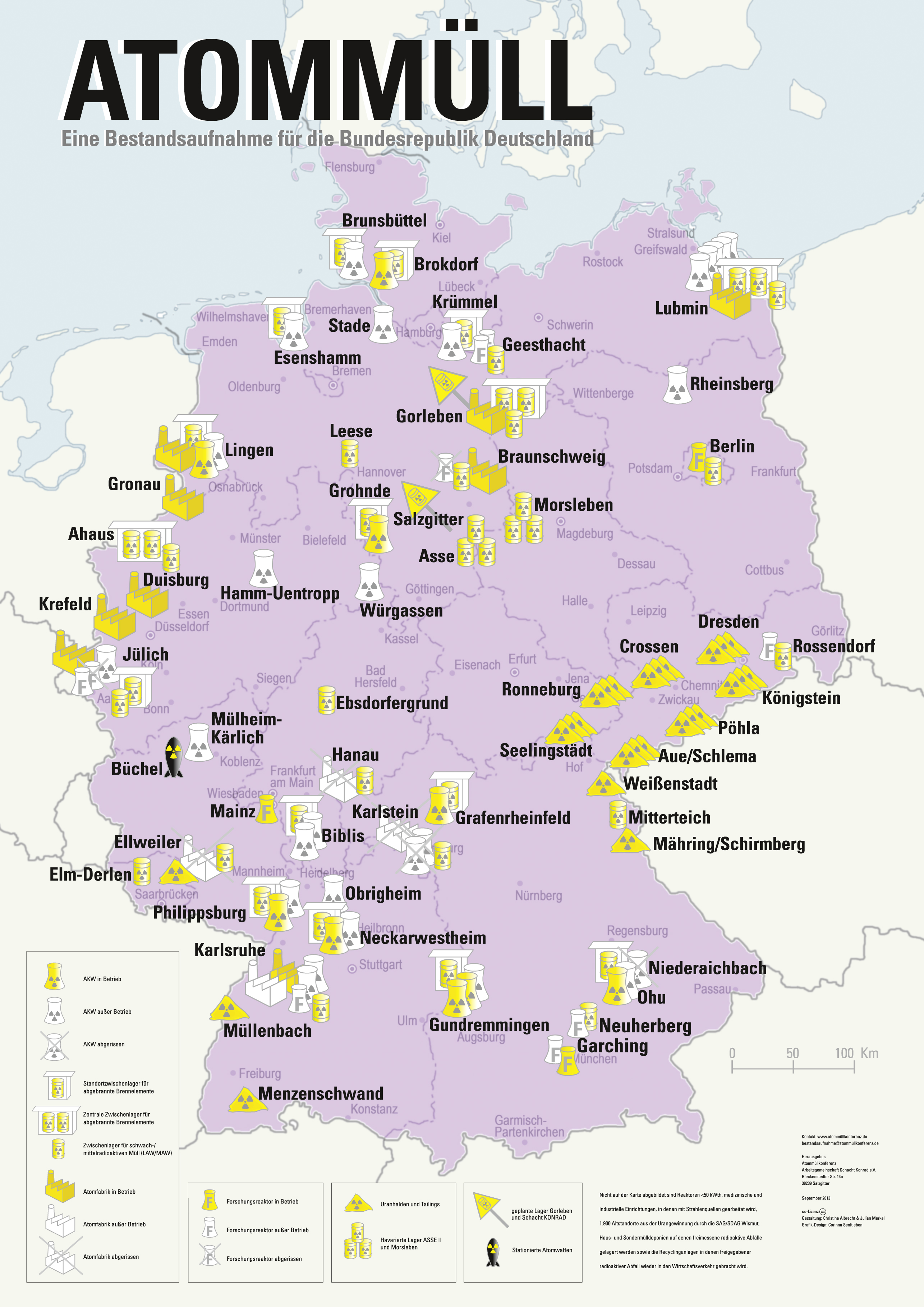 Karte der Atomstandorte in Deutschland